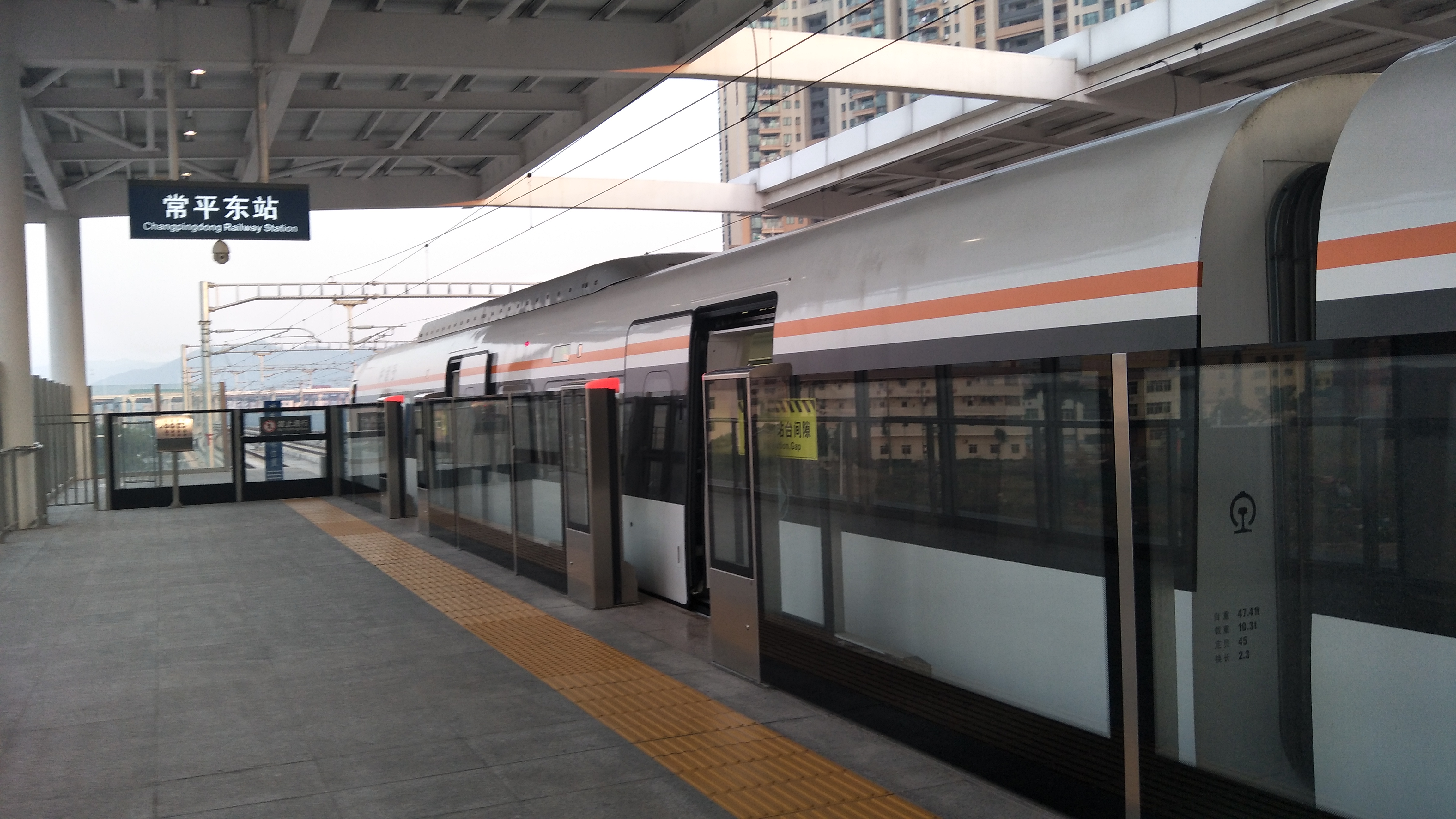 常平东站月台及停靠的CRH6列车